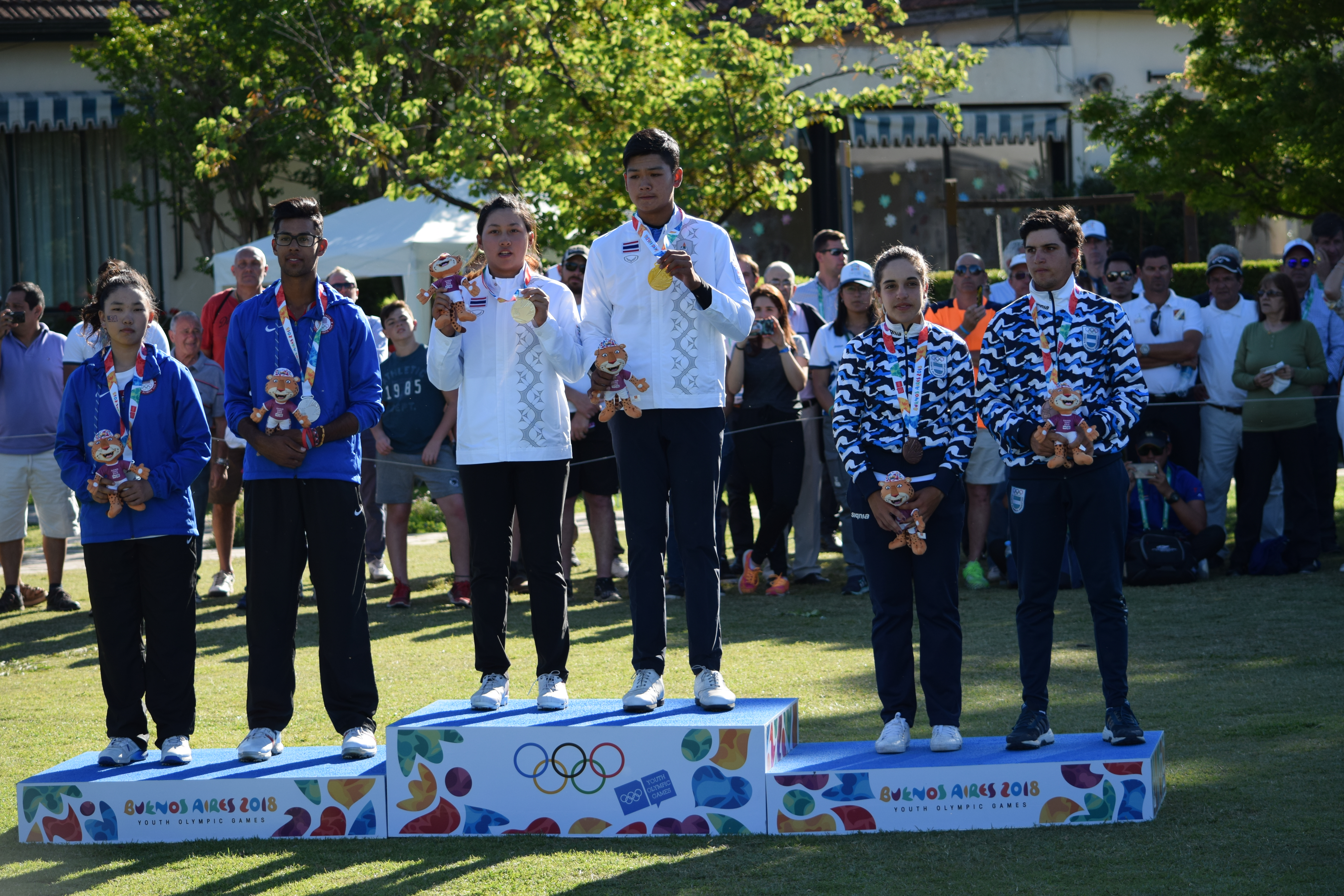 Ceremonia de medallas de los equipos de golf mixtos, durante los Juegos Olímpicos de la Juventud 2018 en Buenos Aires. Lucy LI, Akshay BHATIA, Atthaya THITIKUL, Vanchai LUANGNITIKUL, Mateo FERNANDEZ de OLIVEIRA y Ela ANACONA.